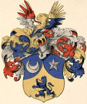 Manekeni suguvõsa aadlivapp